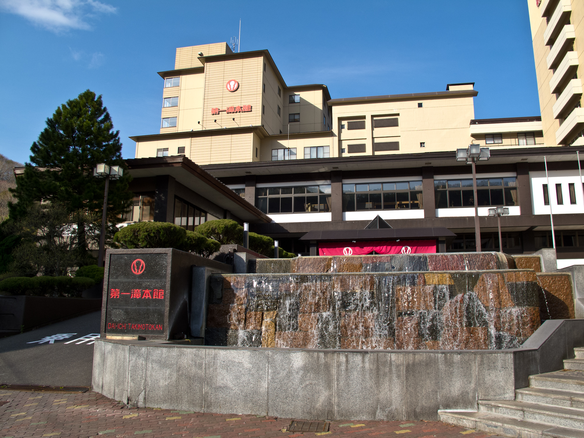 第一滝本館